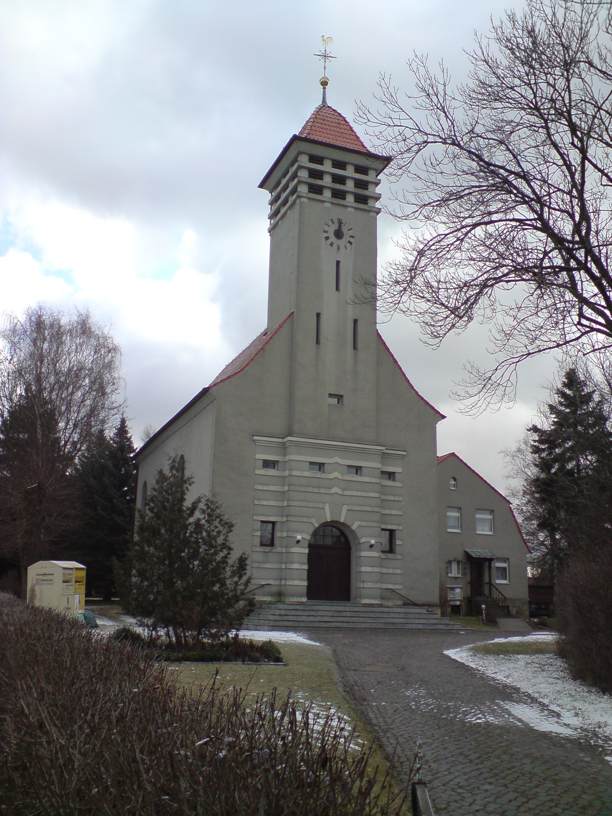 Katholiche Kirche im Flecken Weferlingen